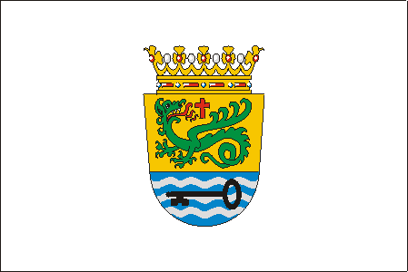 Bandera de Puerto de la Cruz (Tenerife, Santa Cruz de Tenerife, España)